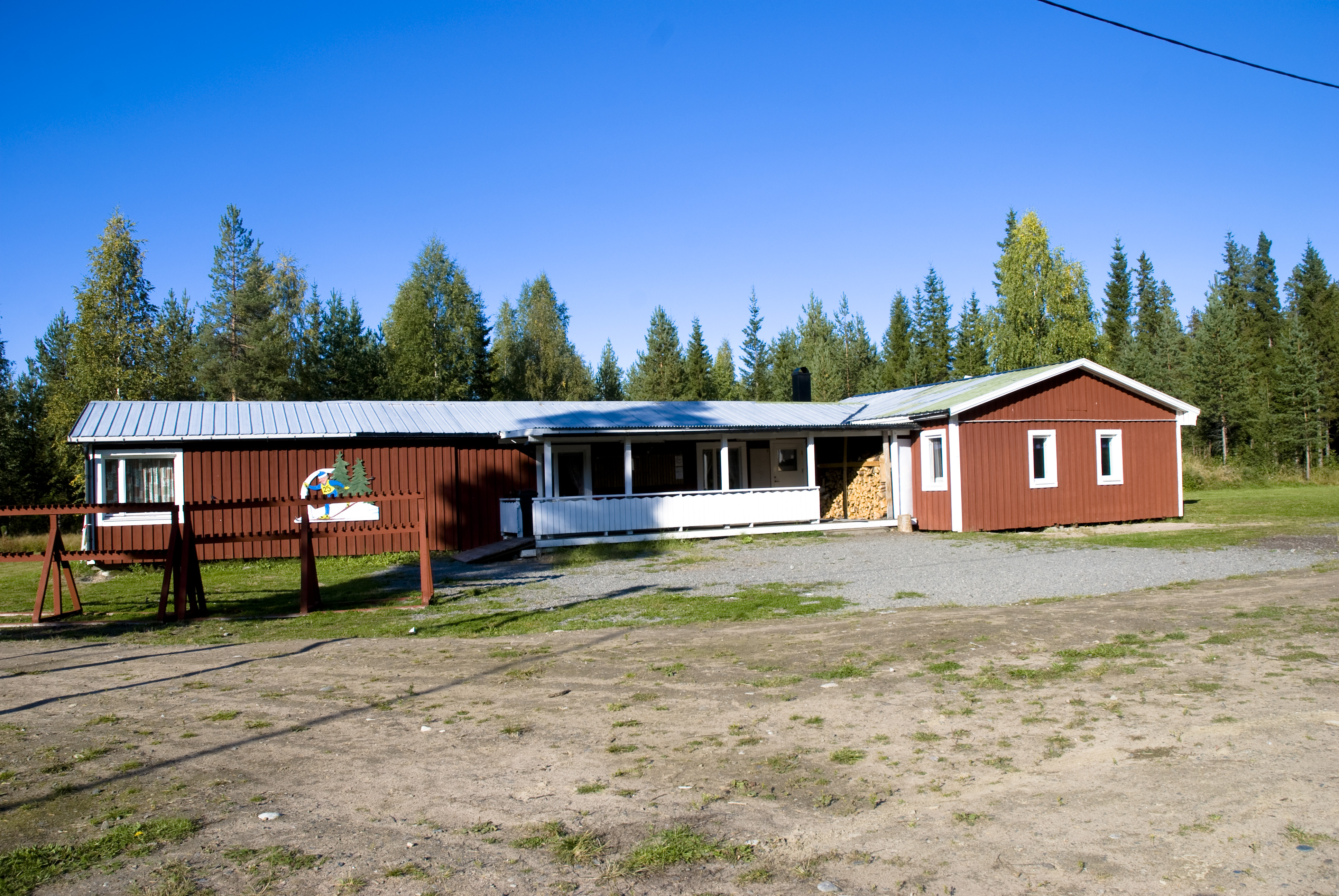 Sävast Ski Teams klubbhus, även känt som "Skidstugan".